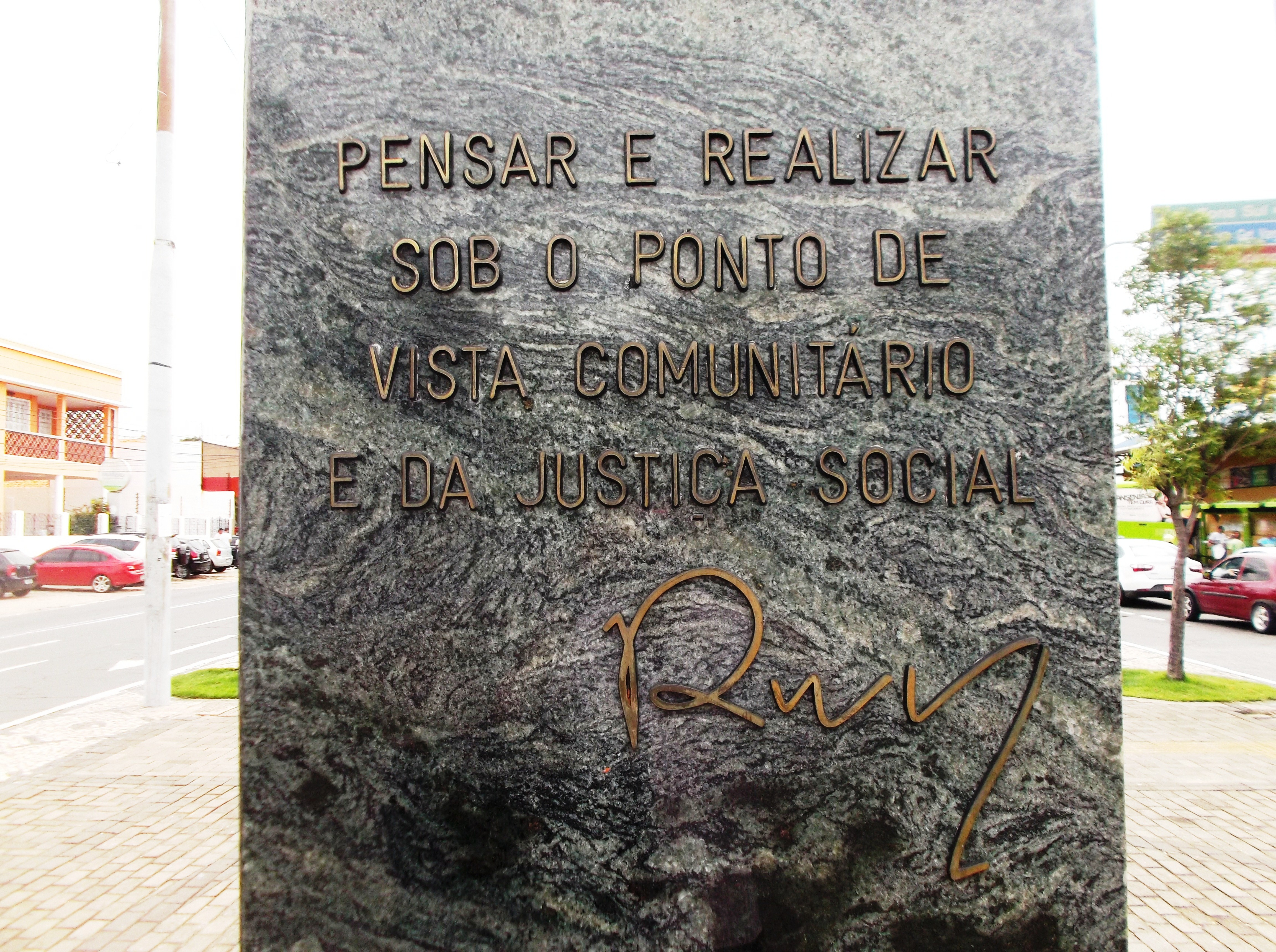 Frase de pensamento de Wall Ferraz em base de estátua na Avenida Frei Serafin, em Teresina.